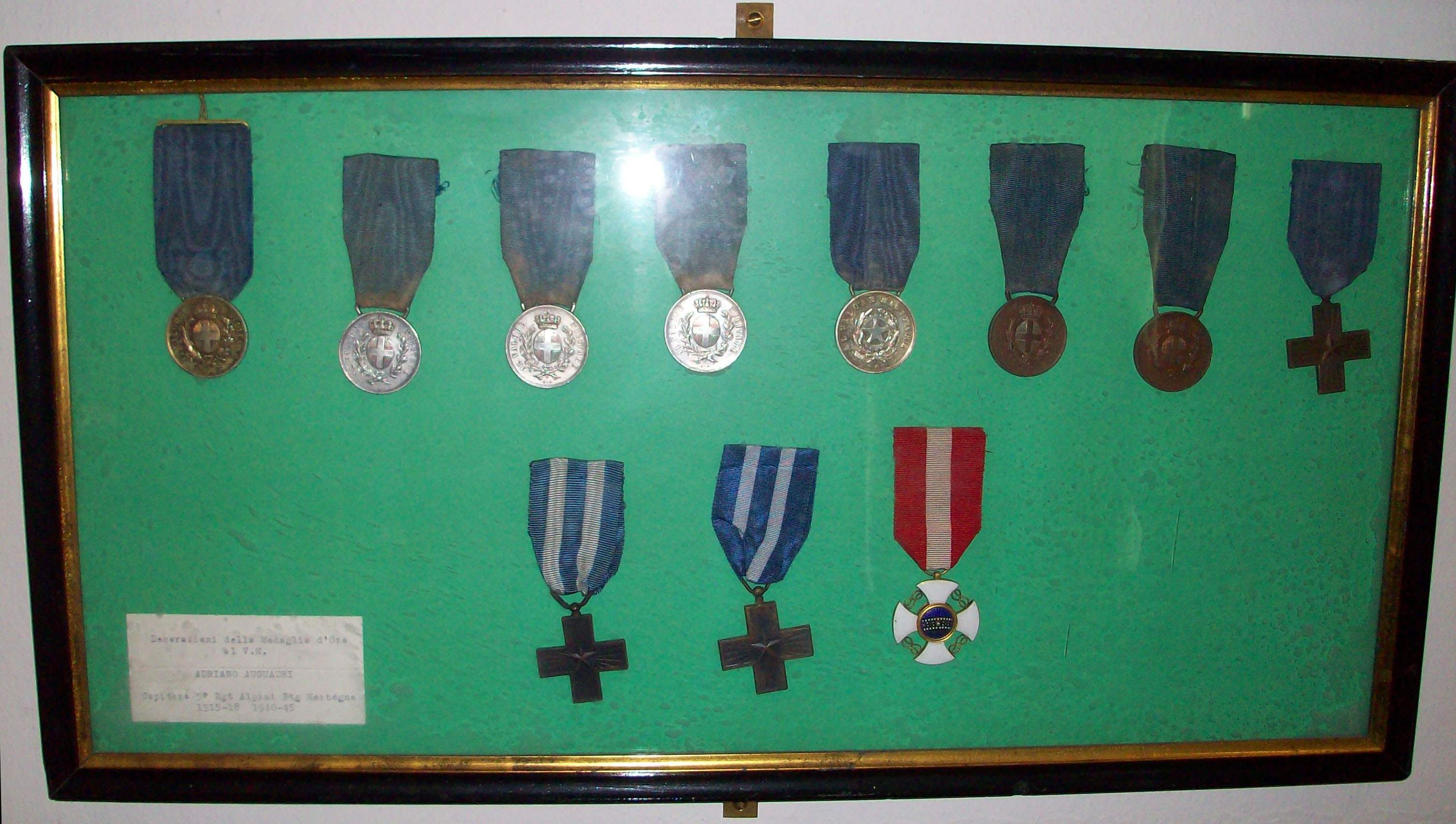 Quadro contenente le onorificenze appartenute ad Adriano Auguadri, ufficiale degli alpini decorato con Medaglia d'Oro al Valor Militare. Il medagliere è conservato presso il Museo Civico di Como.